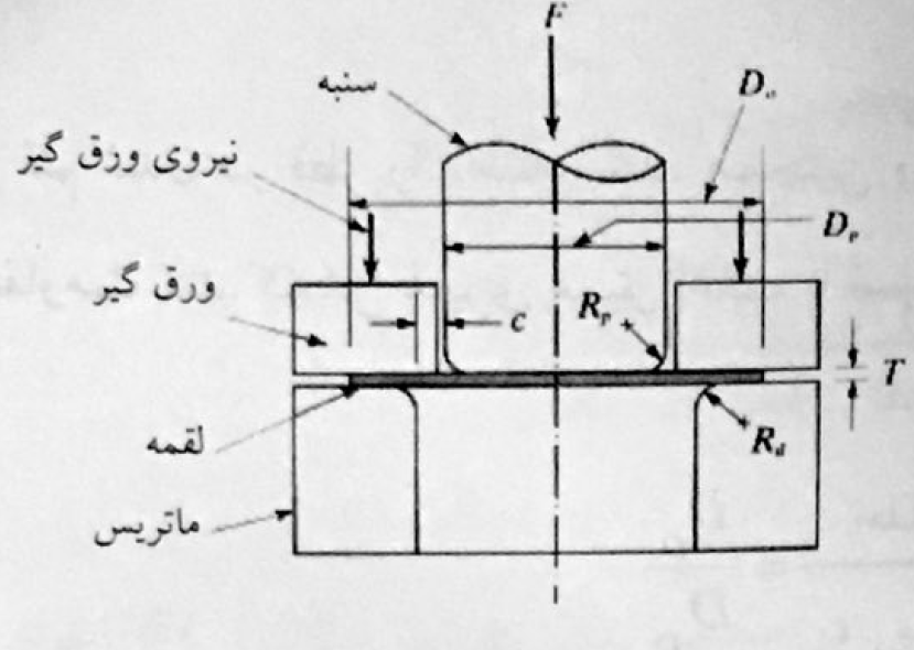 شماتیک فرآیند کشش عمیق